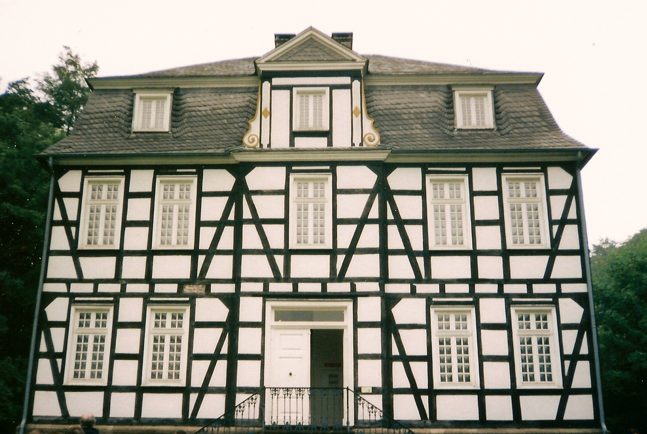 Das ehemalige Neunkirchener Amtshaus von 1754, heute im Freilichtmuseum Hagen.